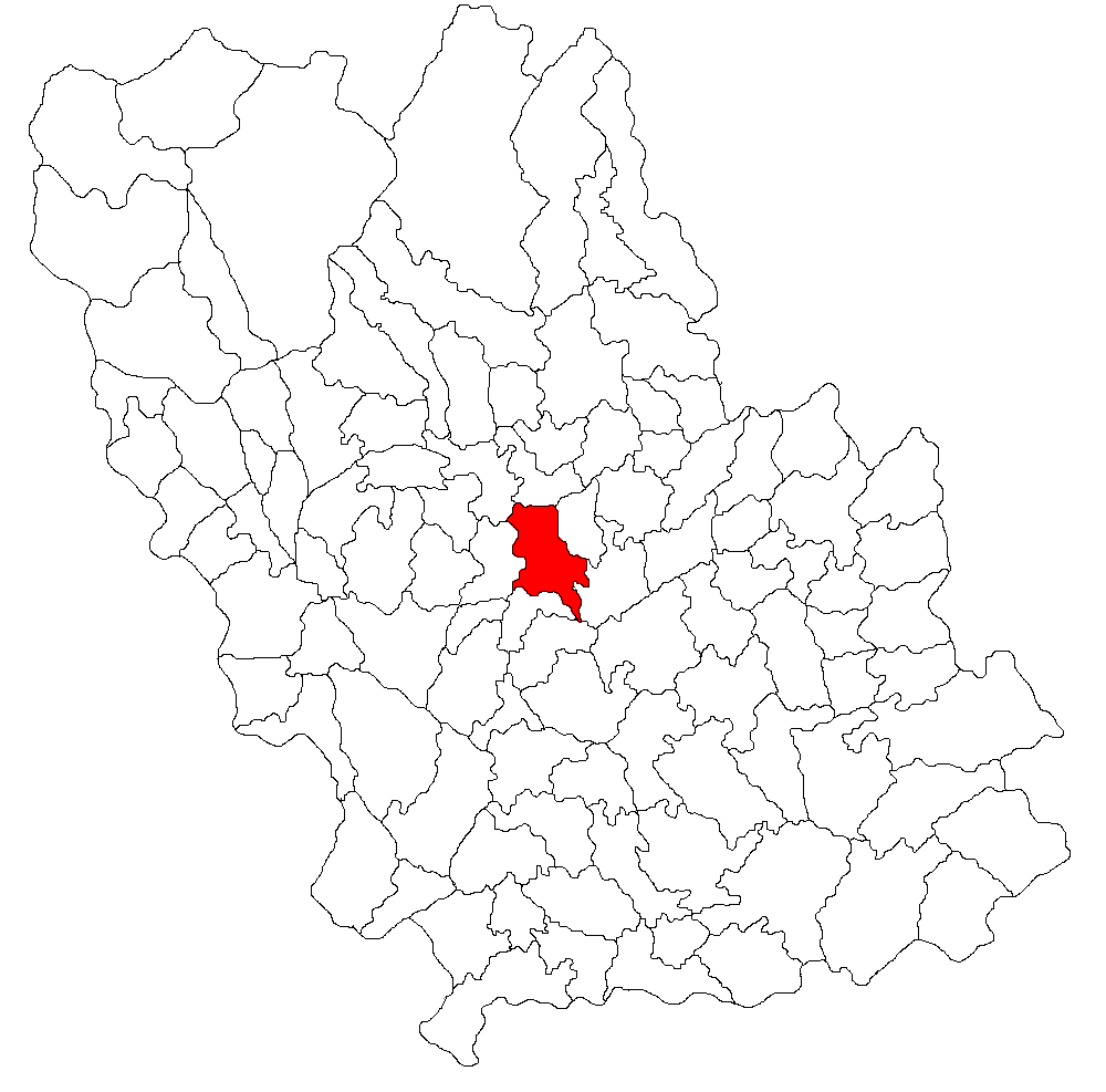 Categorie:Hărţi ale judeţului Prahova